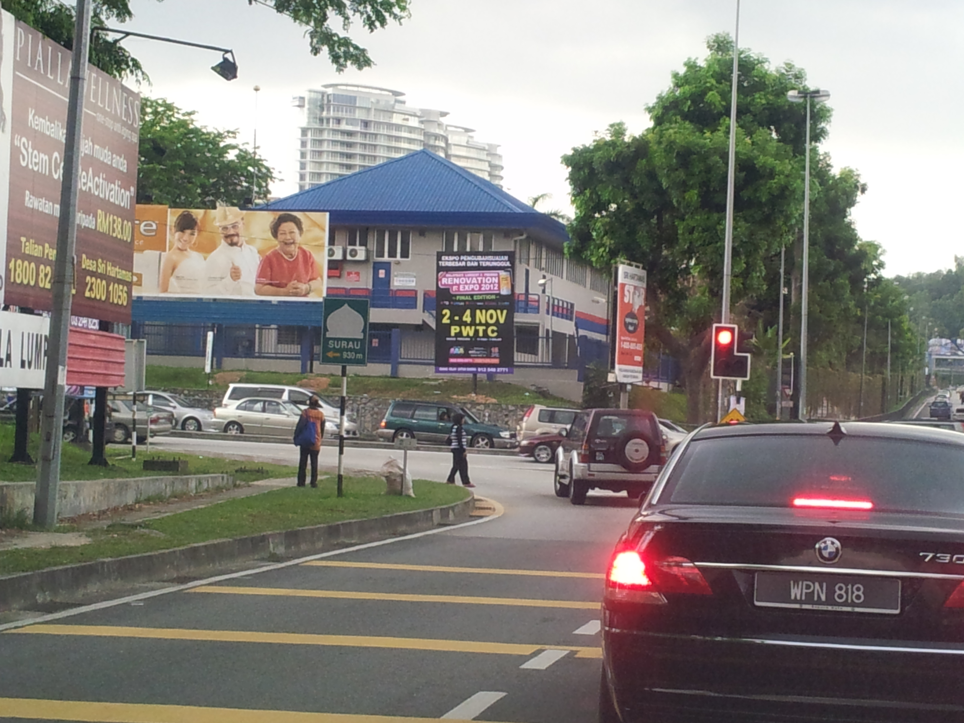 Sri Hartamas 2